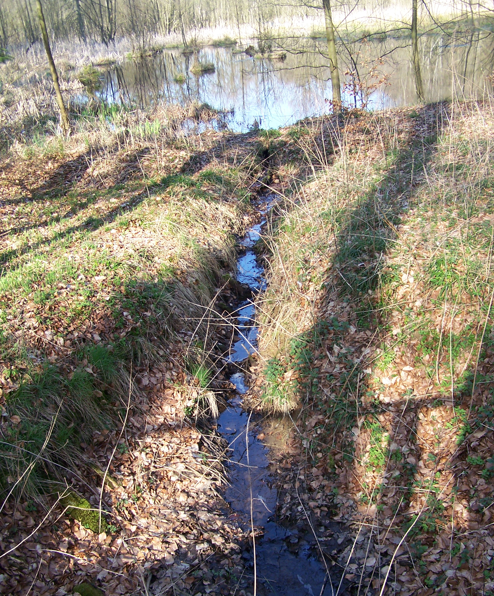 Abfluss des Schwarzen Sees in Schlemmin